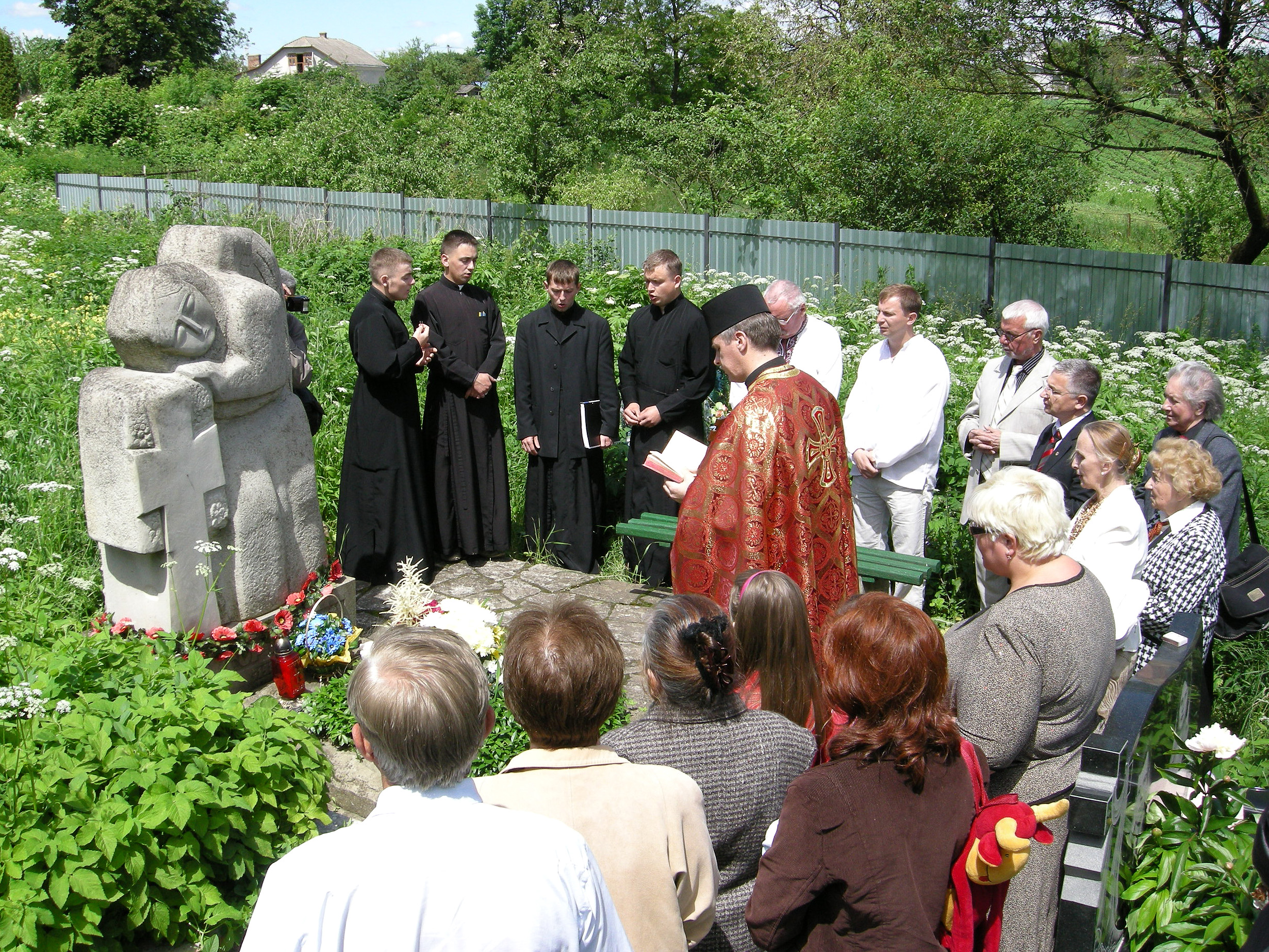 Панахида на могилі археолога, мистецтвознавця, громадсько-політичного діяча, заслуженного діяча мистецтв України І. П. Ґерети на кладовищі смт Велика Березовиця Тернопільського району Тернопільської області 5 червня 2010 року. З-поміж присутніх кобзар Микола Литвин, громадсько-політичнs діячs Степан Барна та Ярослав Джоджик, громадсько-культурнs діячs Богдан Хаварівський та статтяОрест Савка, артистка Віра Самчук. Панахиду відправляє декан Великоберезовицького деканату УГКЦ о. Василь Брона.